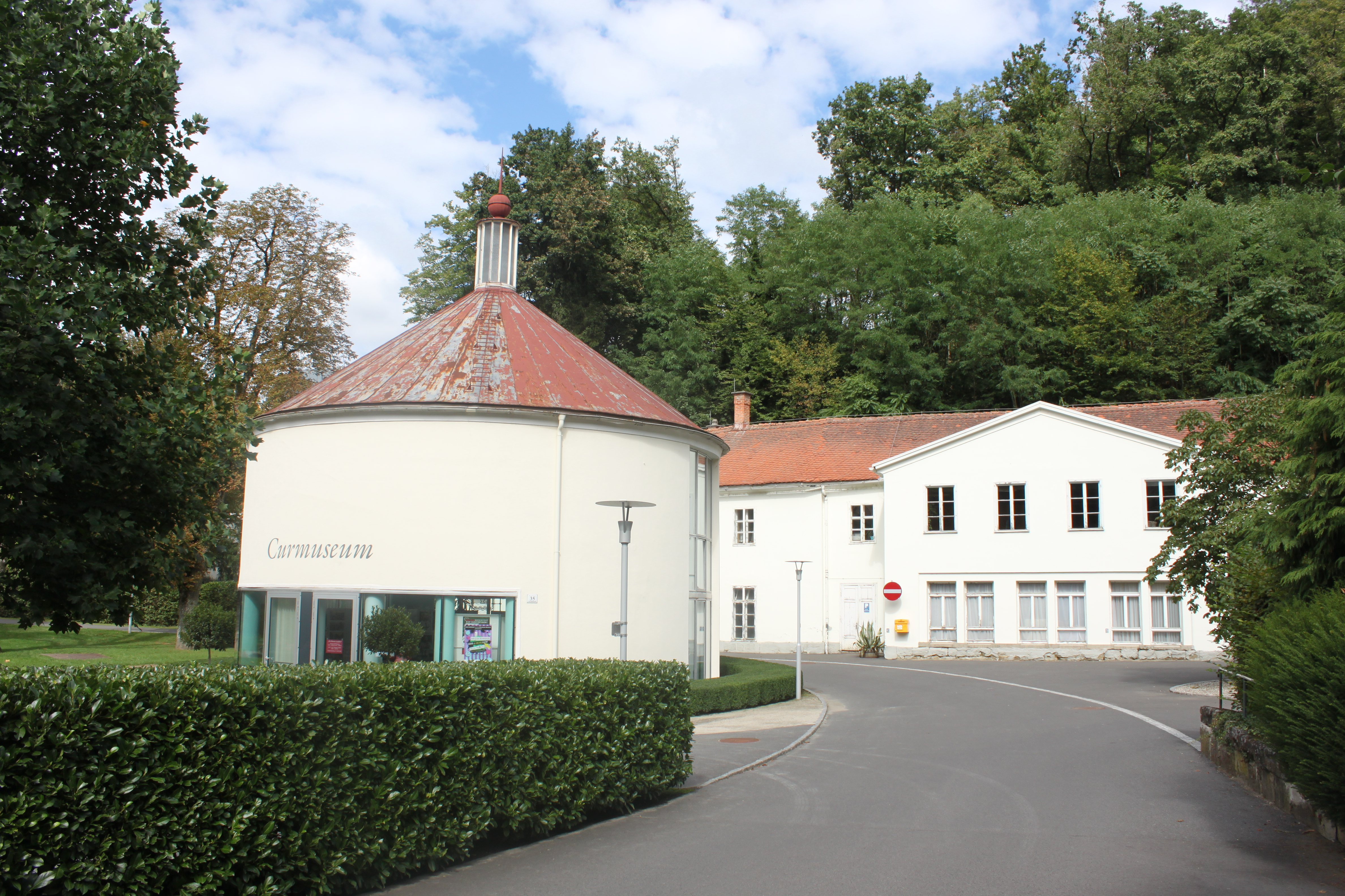 Brunnenhaus beim Kurmittelhaus